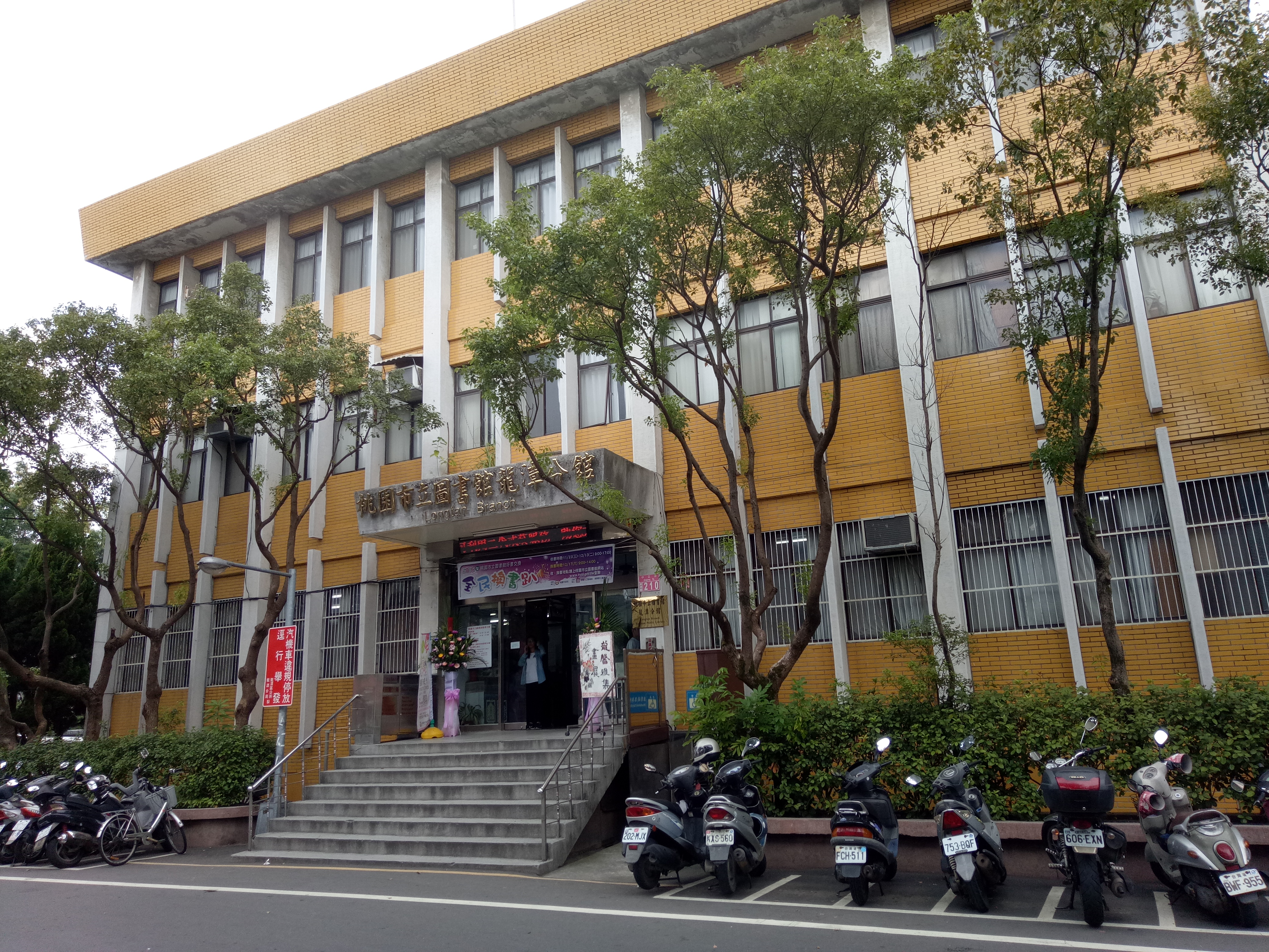 桃園市立圖書館龍潭閱覽室。龍潭分館於107年11月6日遷移至中興路680號，原舊館改為龍潭閱覽室。